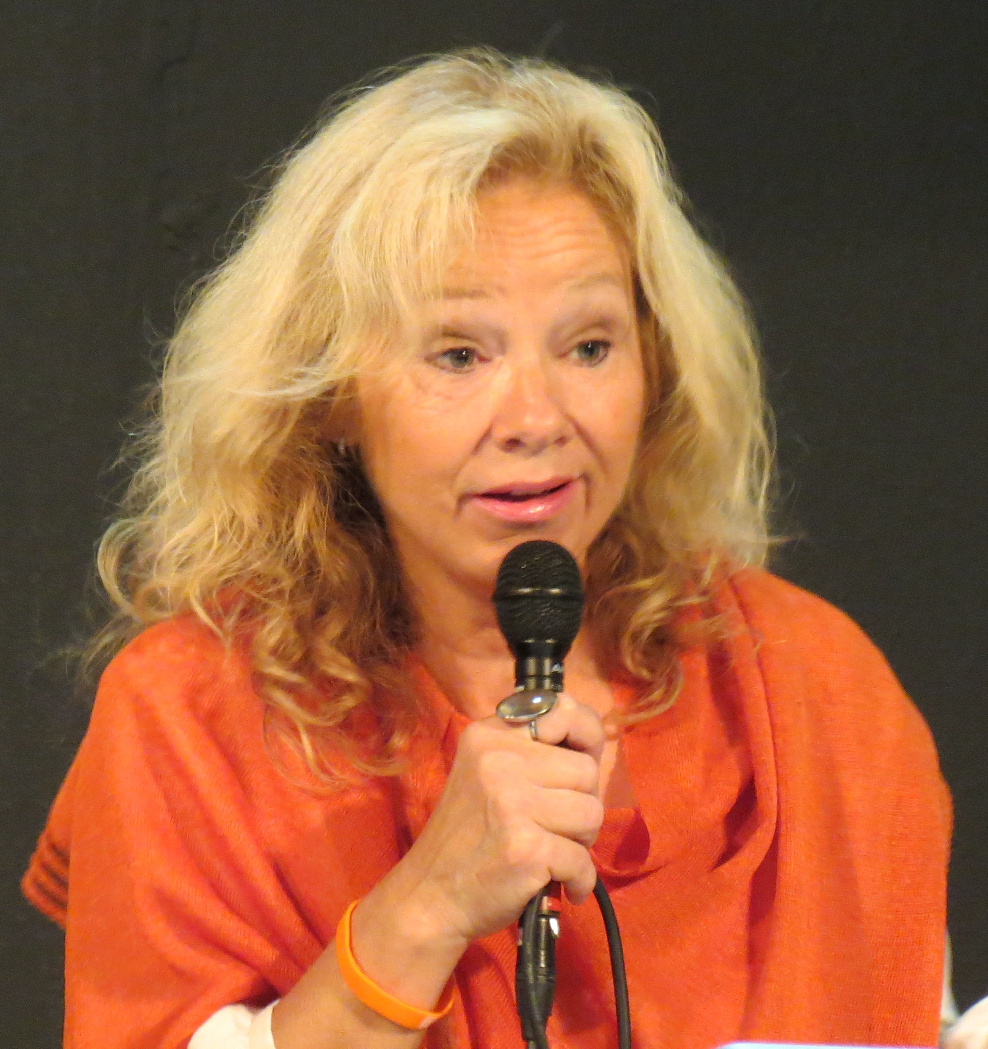 Skådespelerskan Marie Delleskog på Bokmässan i Göteborg 2015.